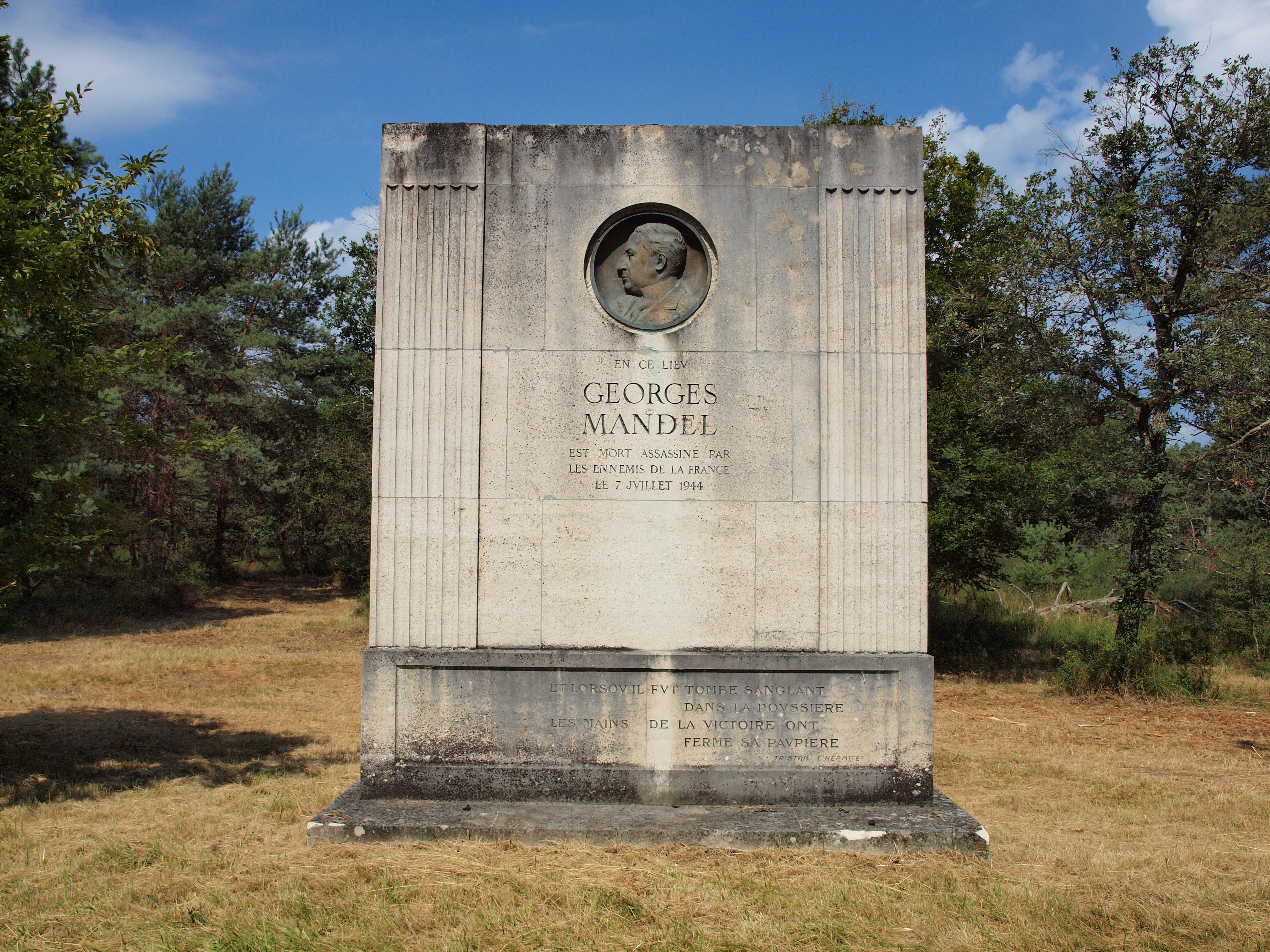 Stèle Georges Mandel de Fontainebleau (Seine-et-Marne, France)